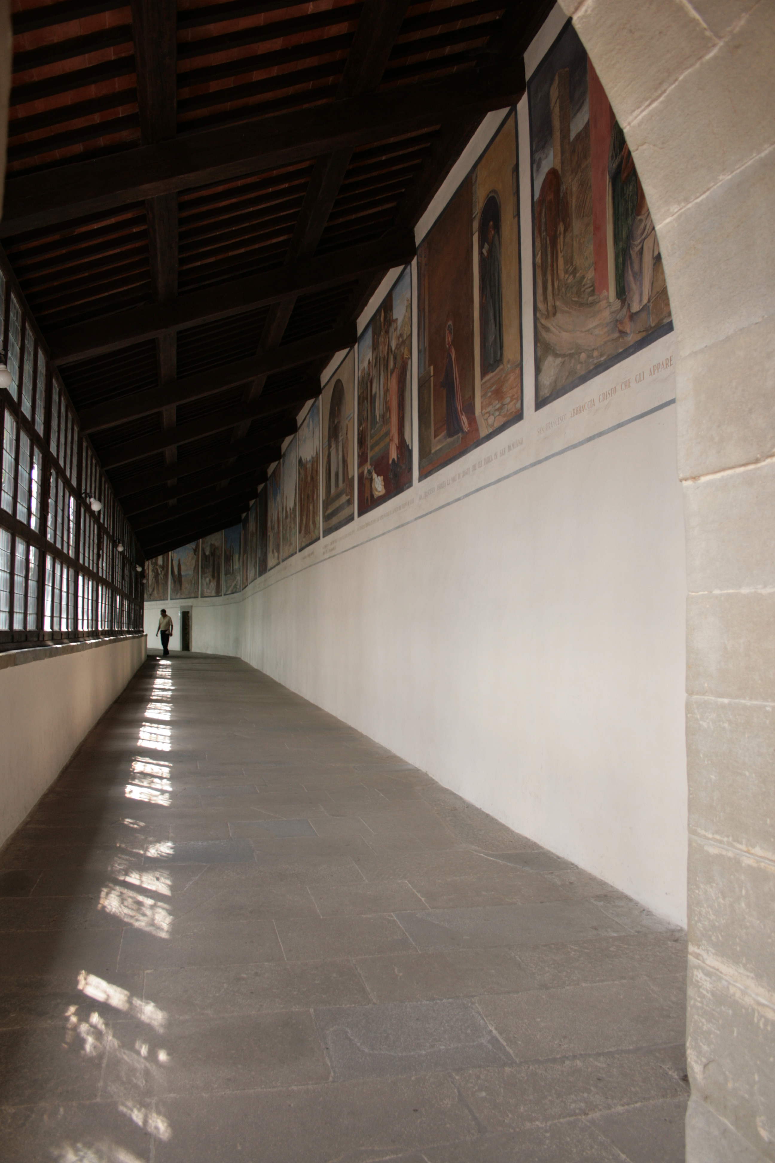 Corridoio affrescato con gli affreschi rappresentanti le stimmate